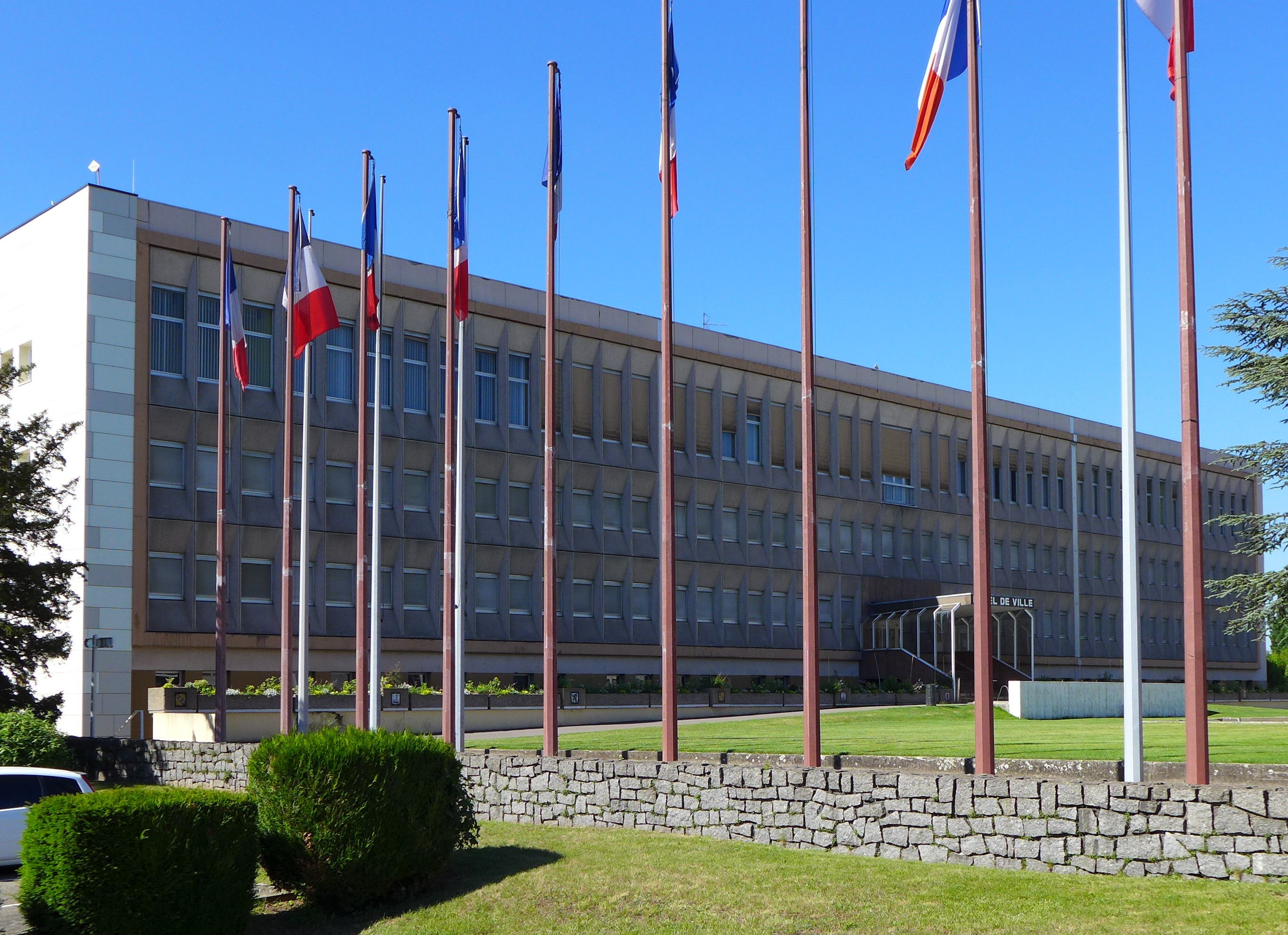 Rathaus der Stadt Forbach